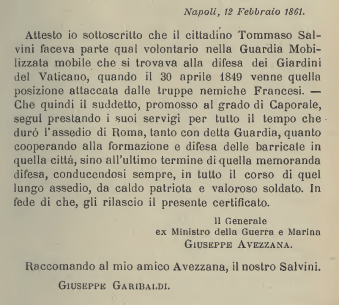 Encomio a Tommaso Salvini per la difesa di Roma del 30 Aprile 1849